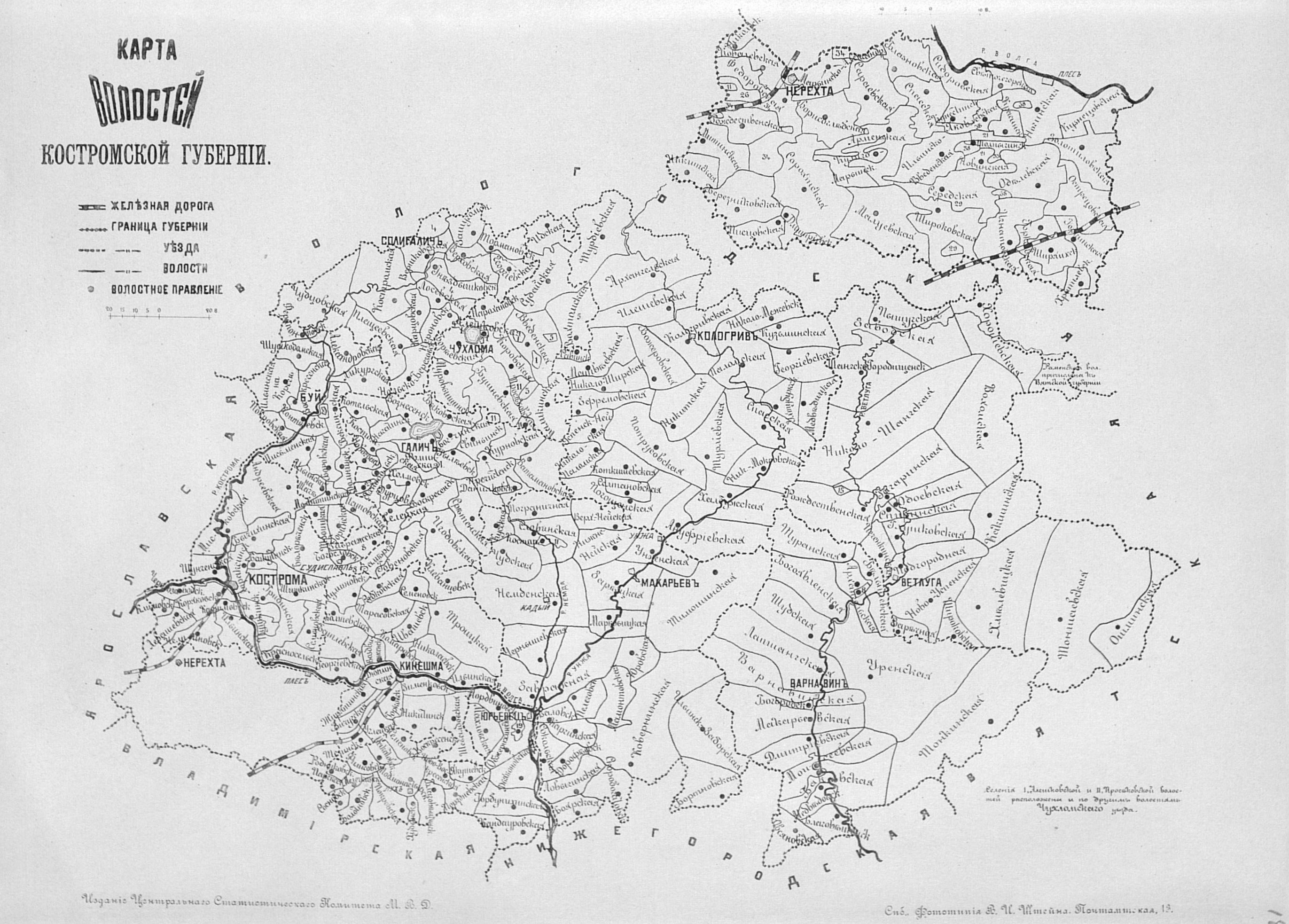 Карта волостей Костромской губернии